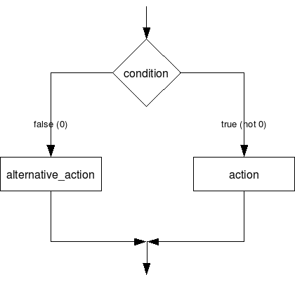 C language example. Illustrates if-else statement.